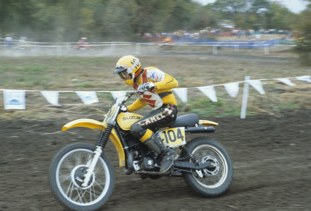 Roger DeCoster, #104 Suzuki at 1977 Rabbit Run Trans-AMA, Dallas